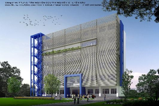 Phối cảnh Trung tâm Nghiên cứu Thí nghiệm chuyên sâu (Khu A3)